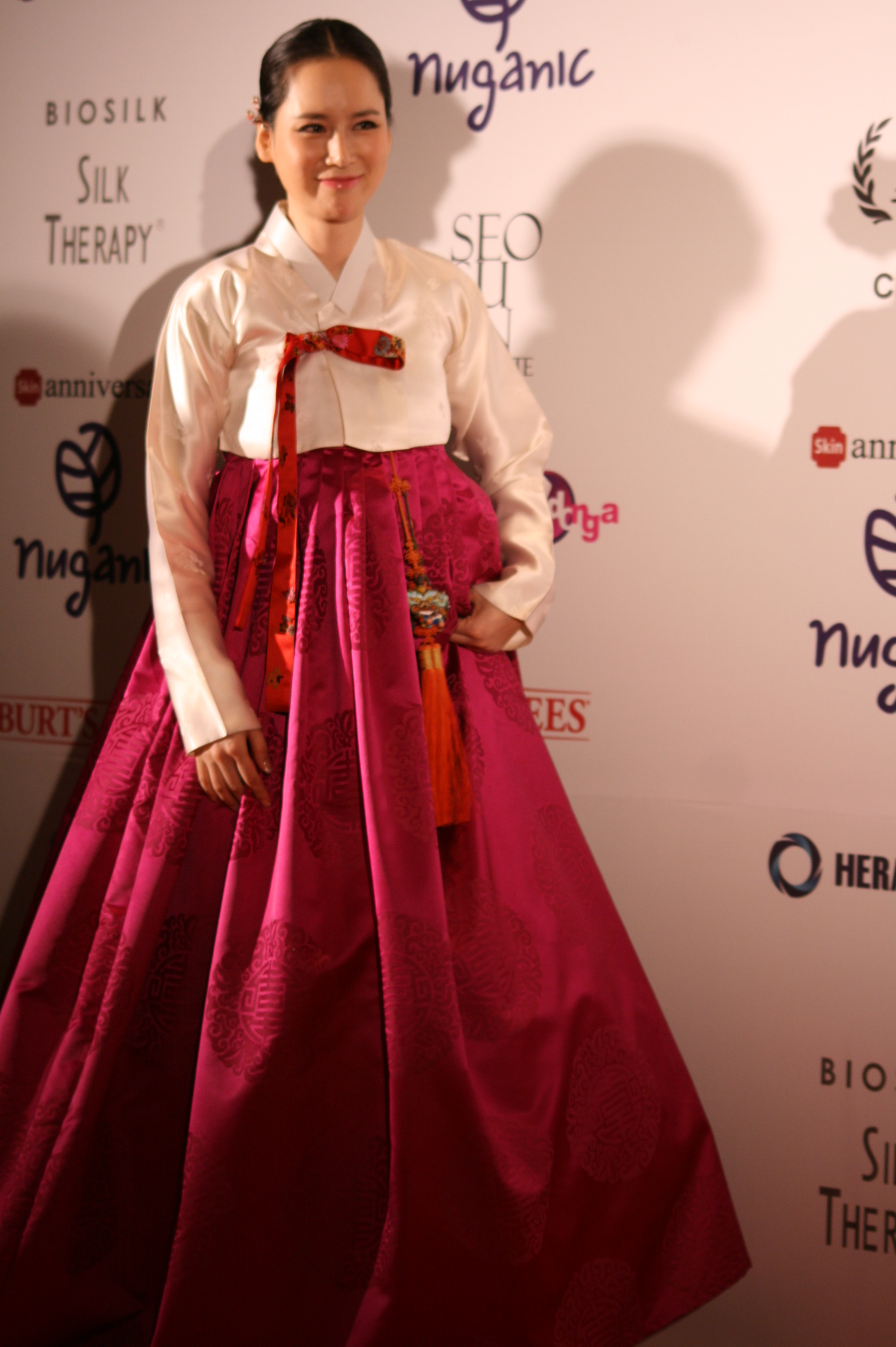 2011 라이프 스타일 어워드